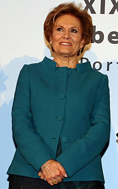 Maria Cavaco Silva, Foto da inauguração da Conferência Ibero-Americana 2009, em Portugal